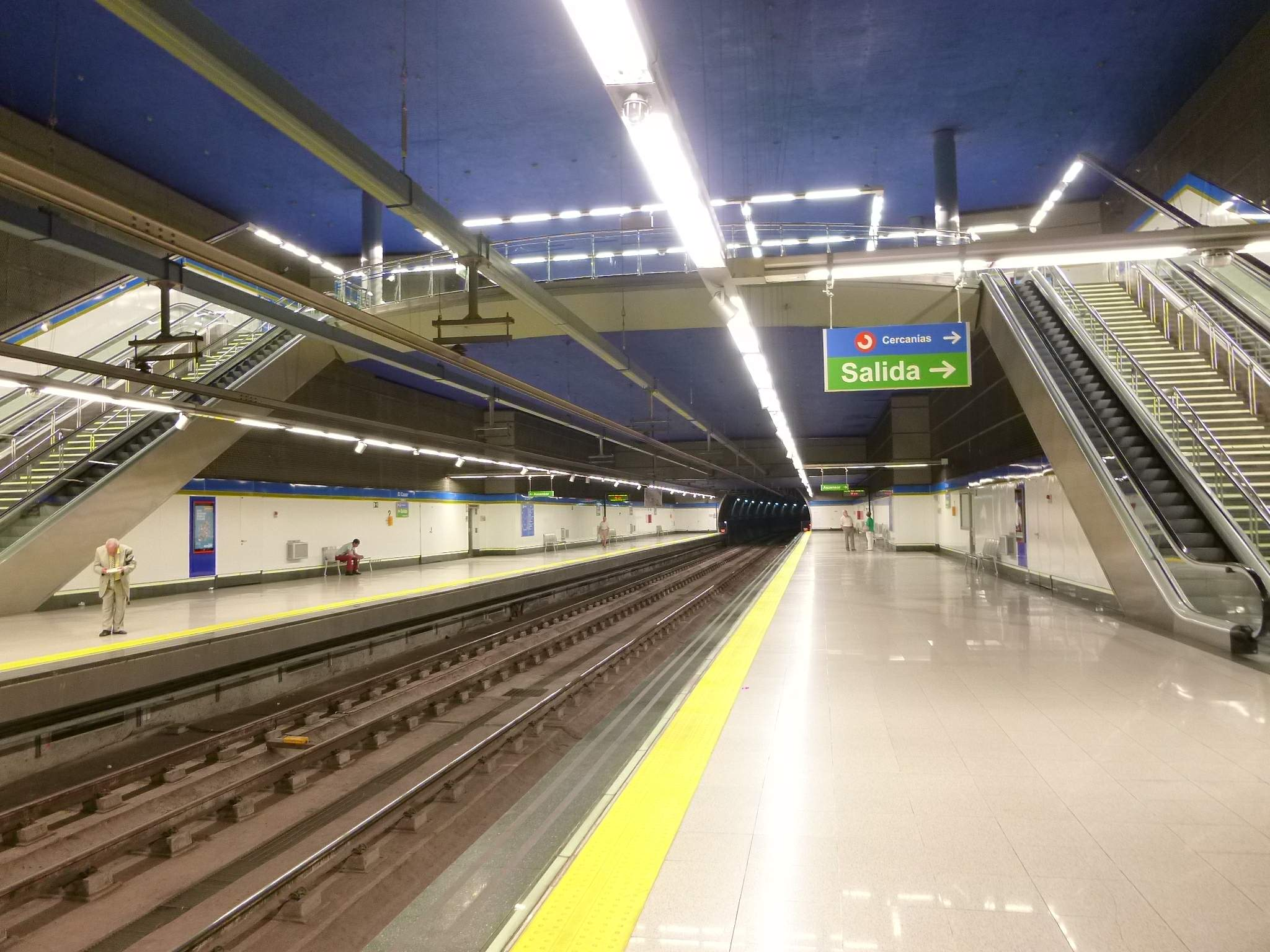 Estación de Metro de El Casar (Getafe, Madrid)